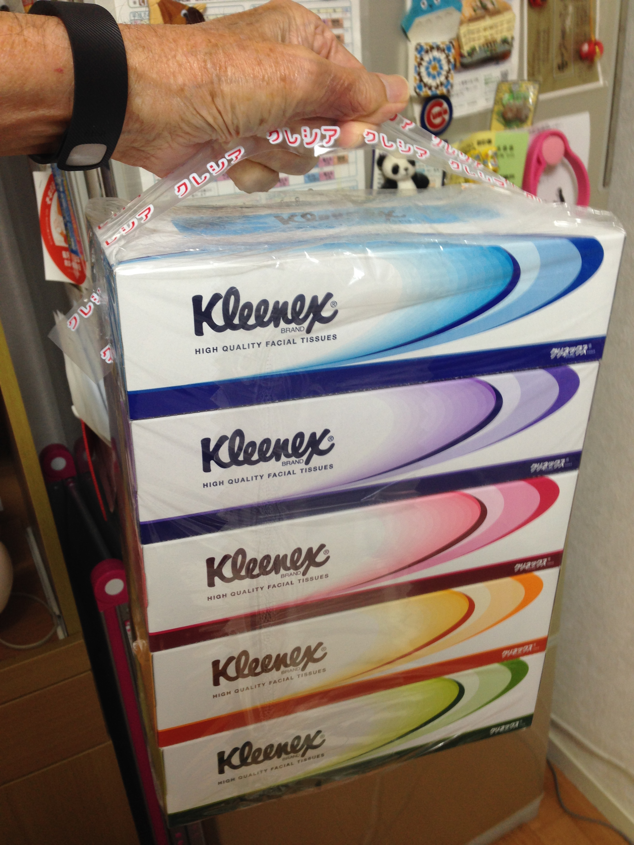 Kleenex packages